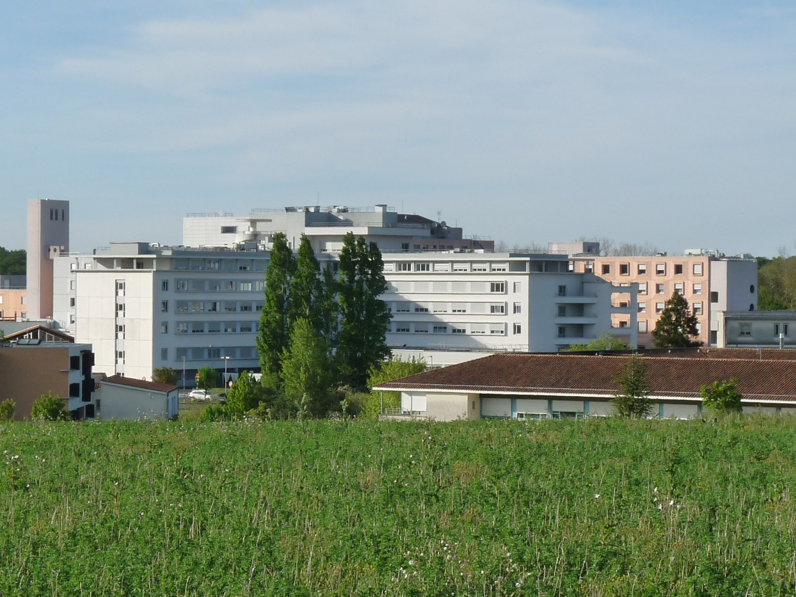 Centre hospitalier d'Angoulême, Girac, Saint-Michel, Charente, France